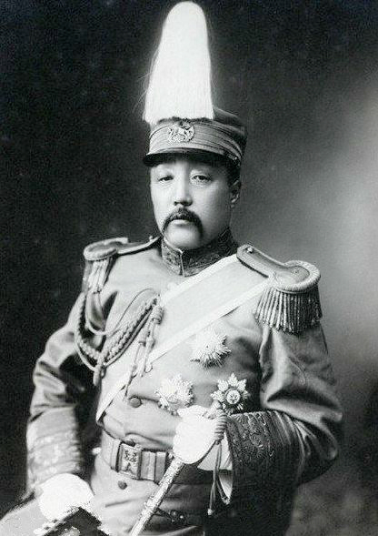 巴英额，北洋政府陆军少将时期